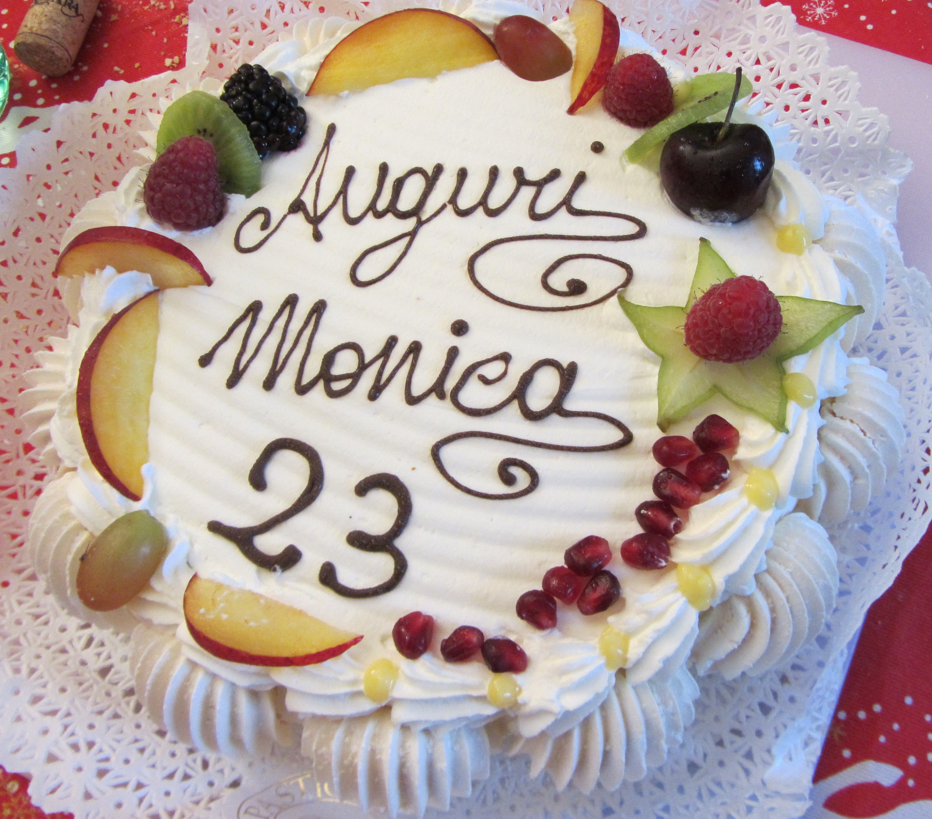 torta Fabiola: Torta di compleanno alla futta, meringhe e panna montata a base di pan di spagna e crema pasticcera di una famosa pasticceria milanese